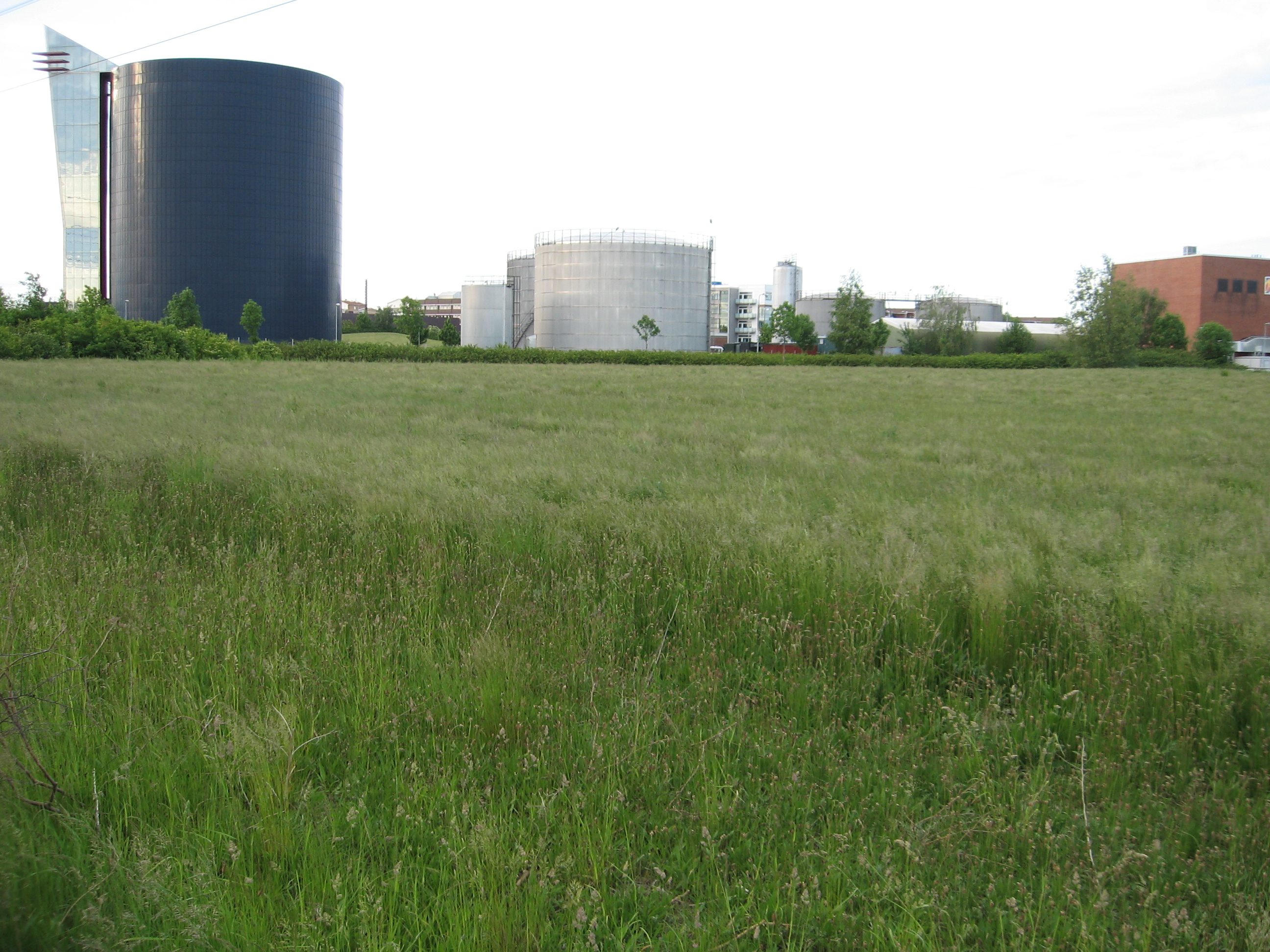 Hetvattenackumulator och oljetank.